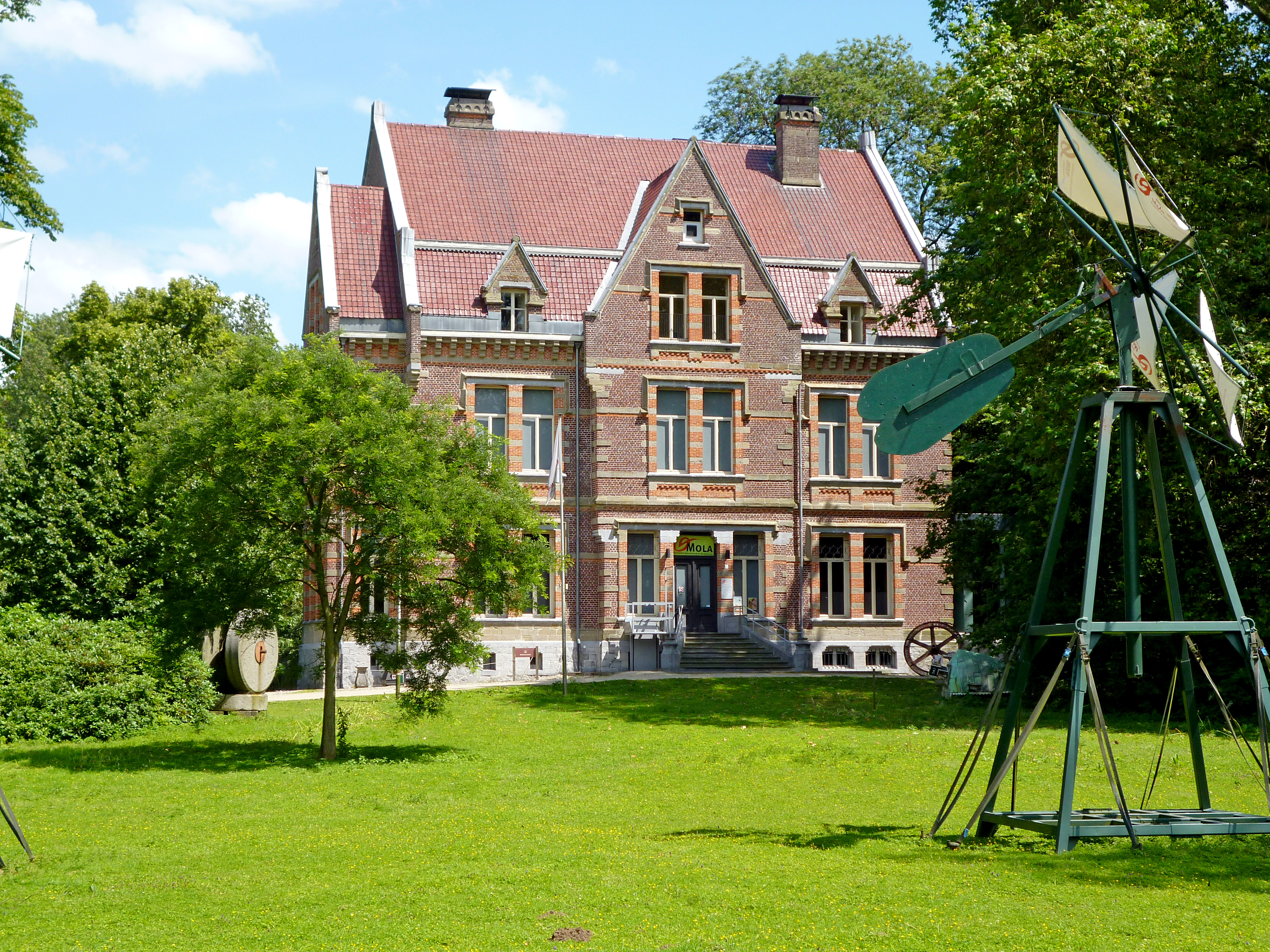 Wachtebeke onroerend erfgoed ID 34390